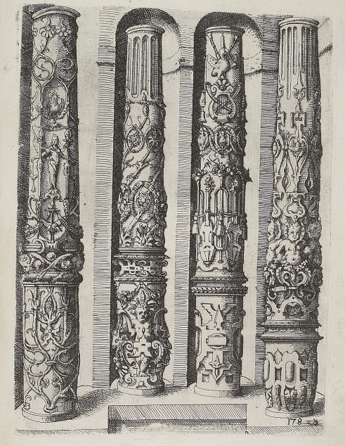 Plate 178 from Wendel Dietterlin's Architectvra: Von Außtheilung, Symmetria vnd Proportion der Fünff Seulen, published in Nuremberg 1598.